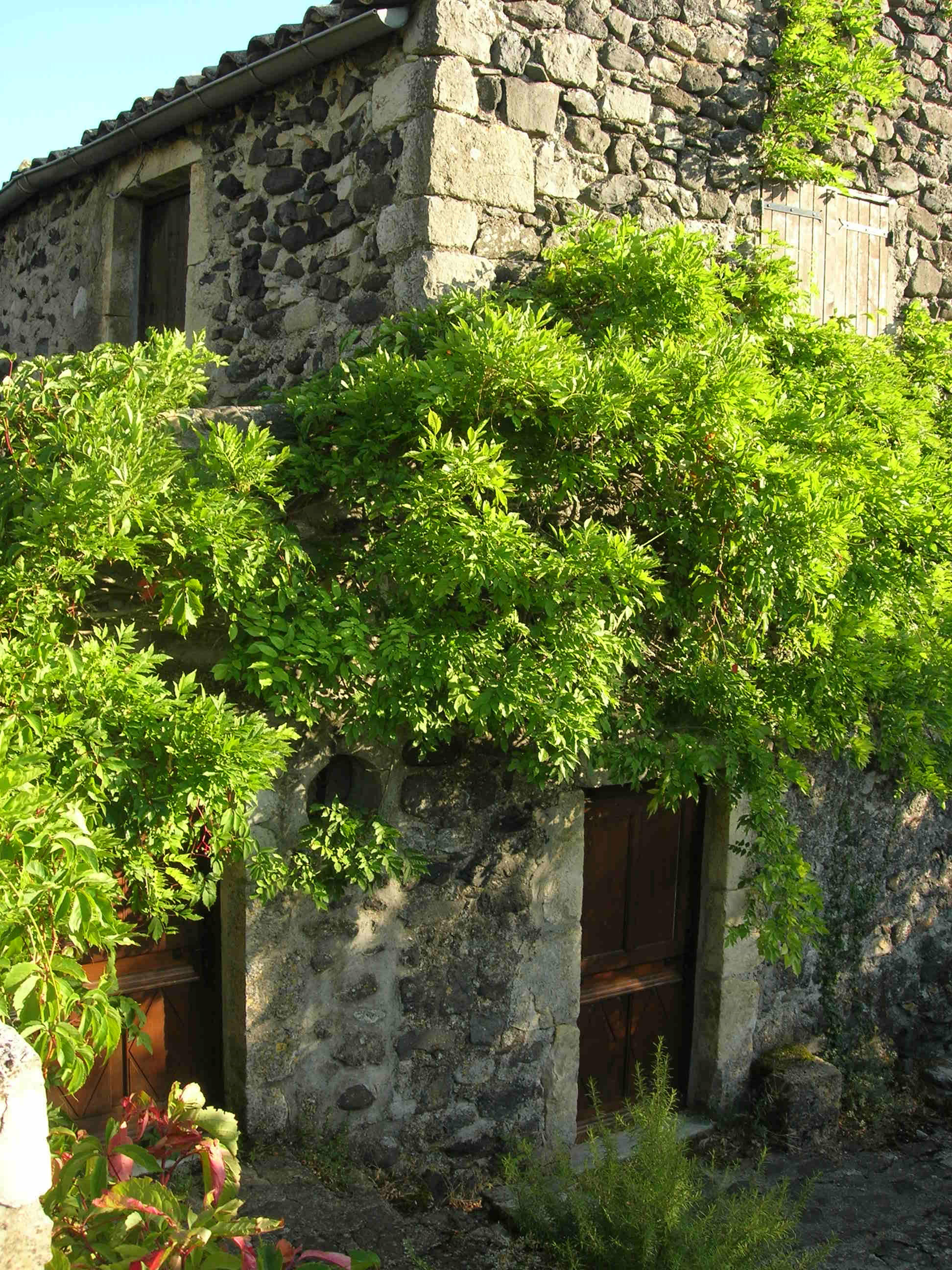 Maison du peintre chilien Eudaldo à la Roche d'Alba, Ardèche (France)